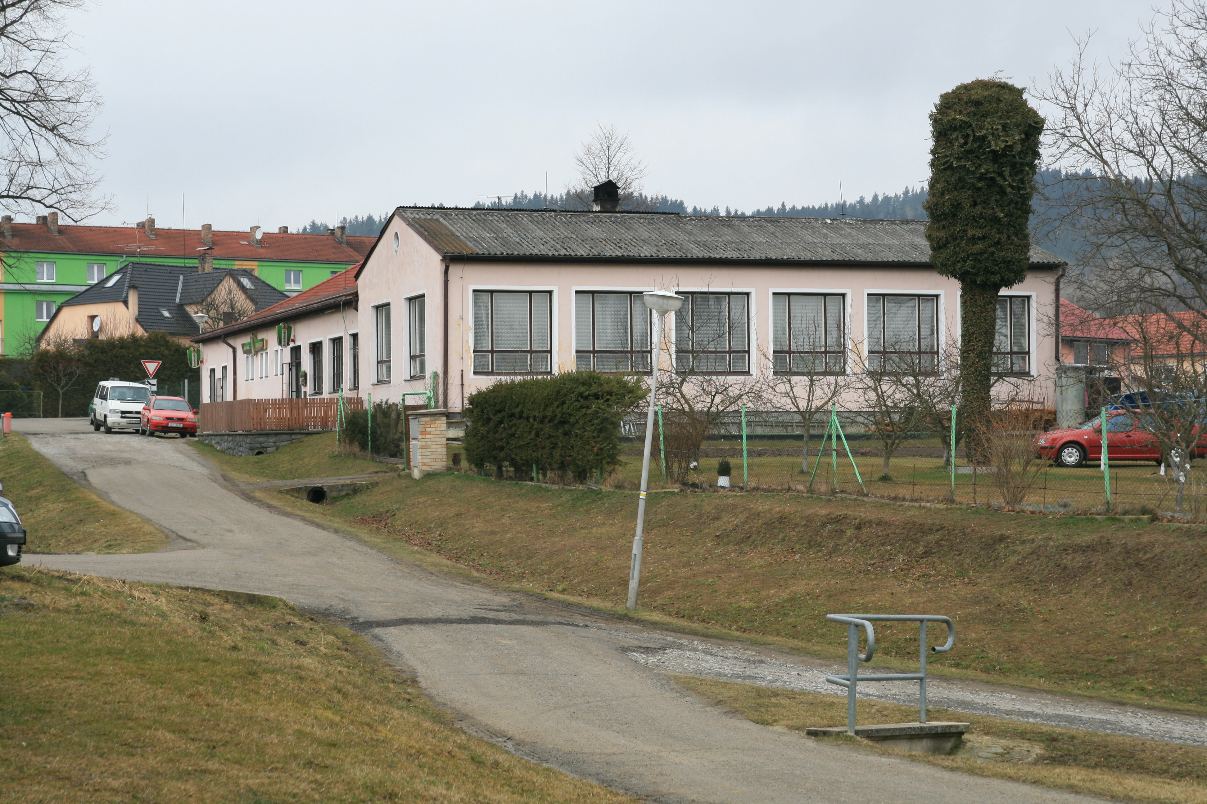 Obec Bujanov v okrese Český Krumlov. Hostinec se sálem na návsi. Pohled směrem od vlakové zastávky a muzea konězpřežky.